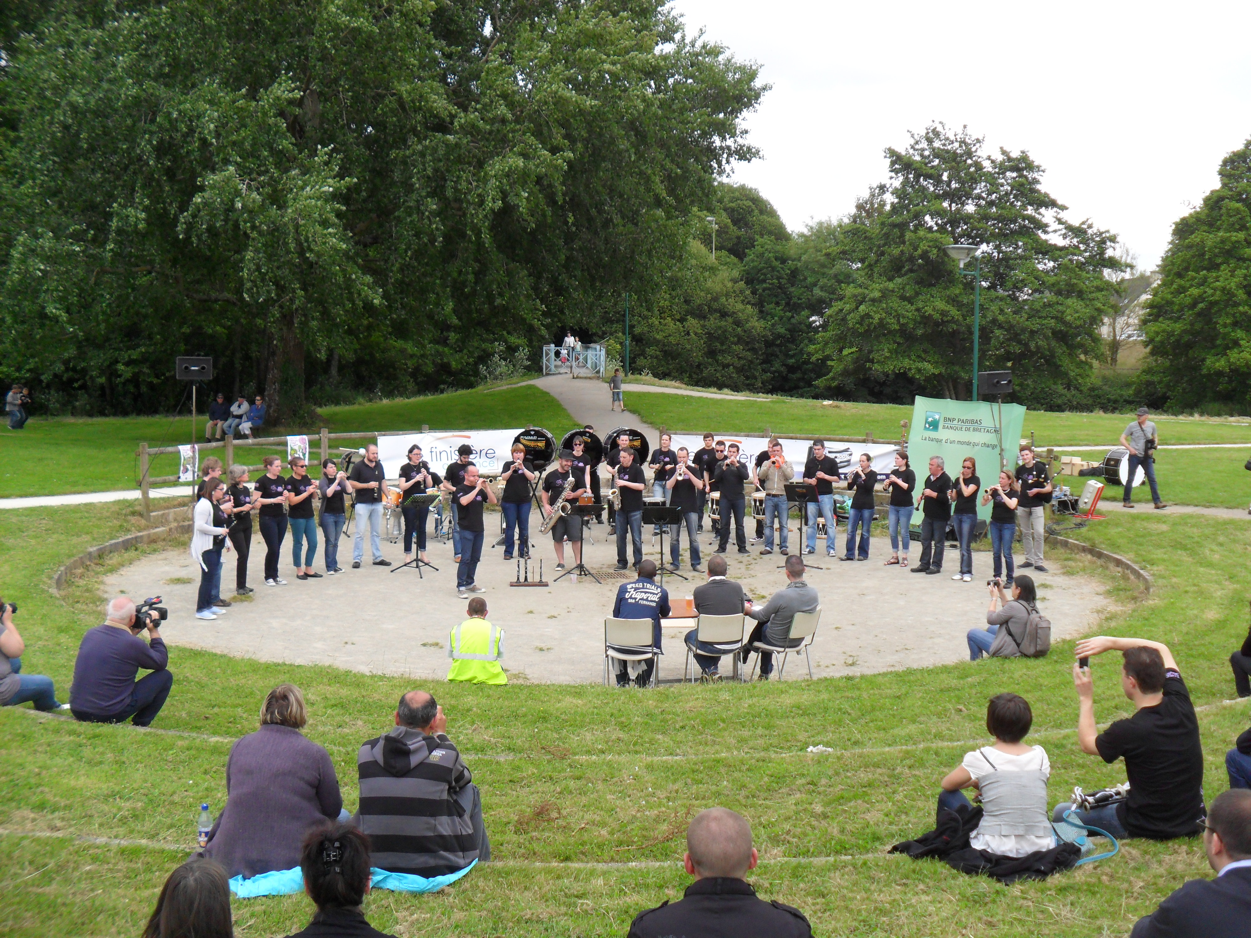 Bagad ar Meilhoù Glaz à la Fête de la Saint-Jean de 2013 au Moulin Vert Quimper (France)